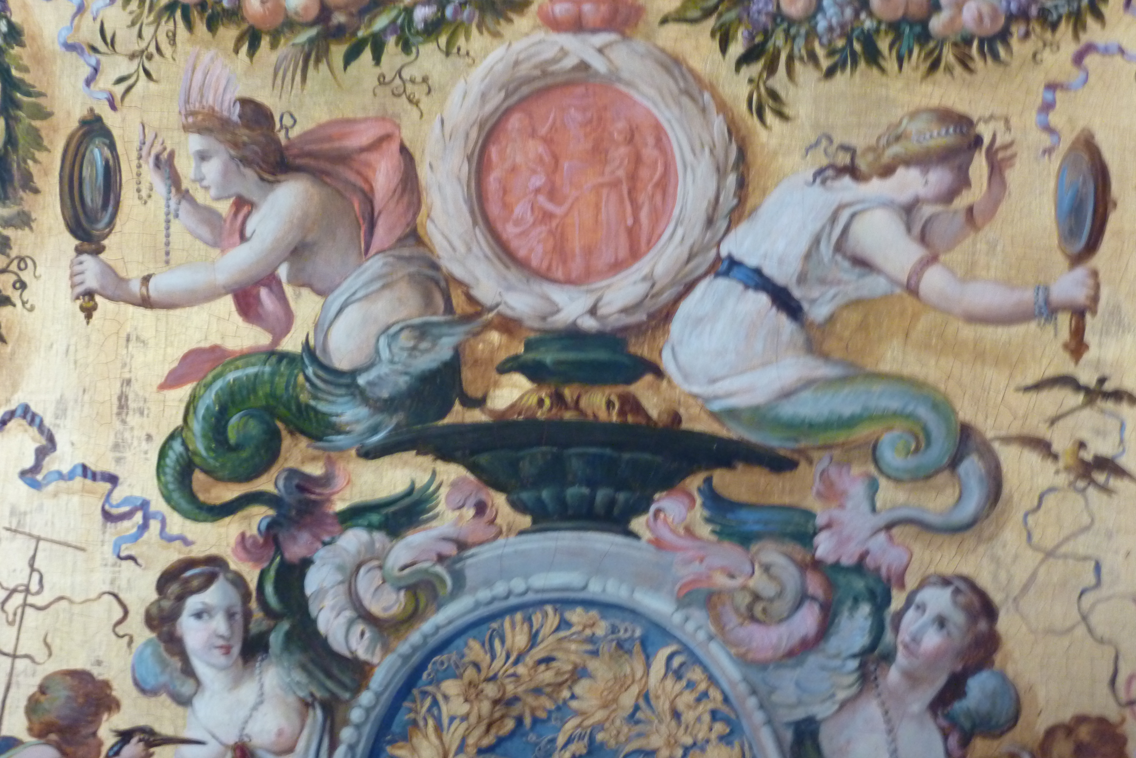 Bibliothèque de l'Arsenal (1 rue de Sully im 4. arrondissement von Paris): ehemalige Wohnräume